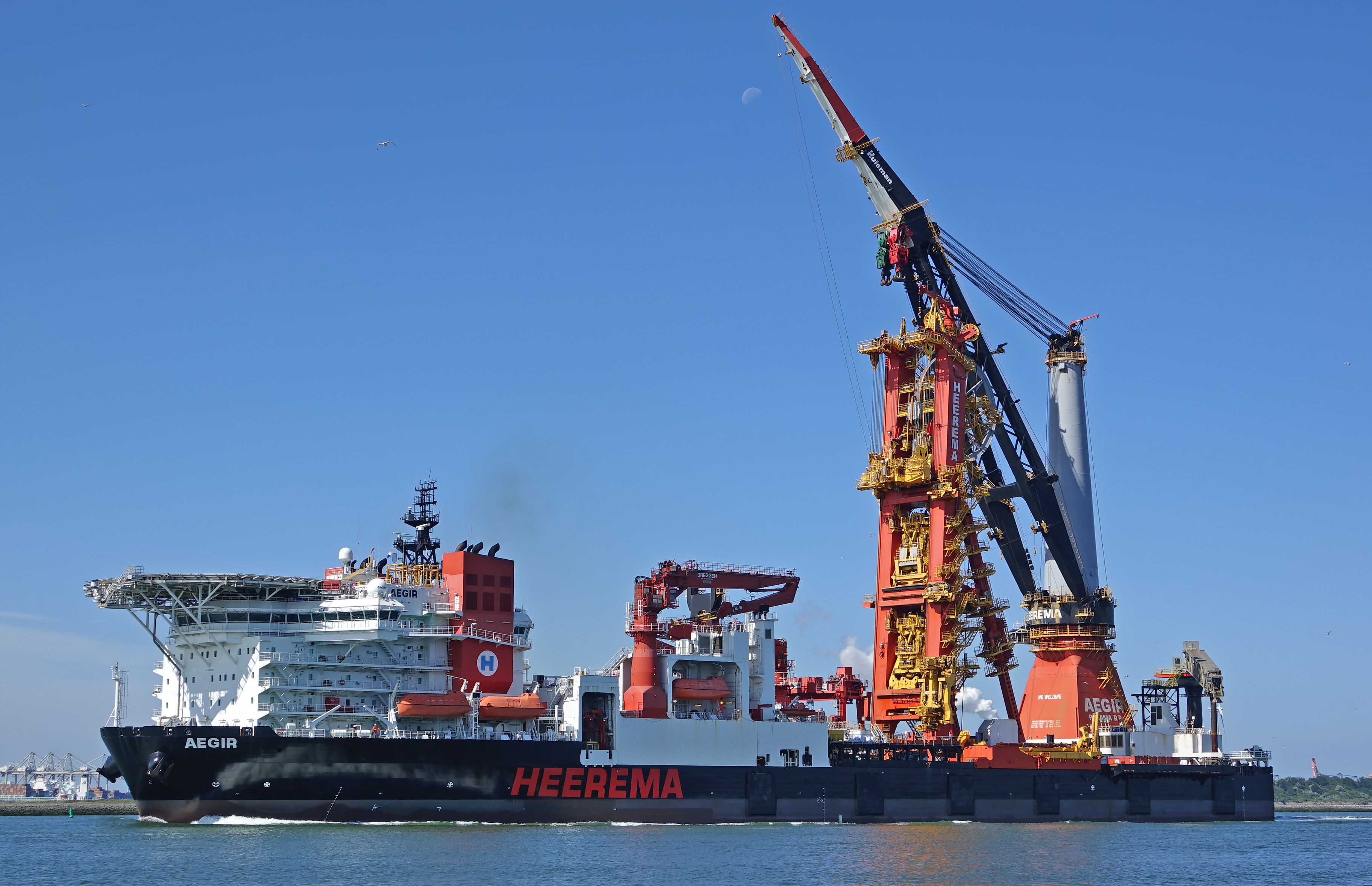 Nieuwe Waterweg 5-7-2018